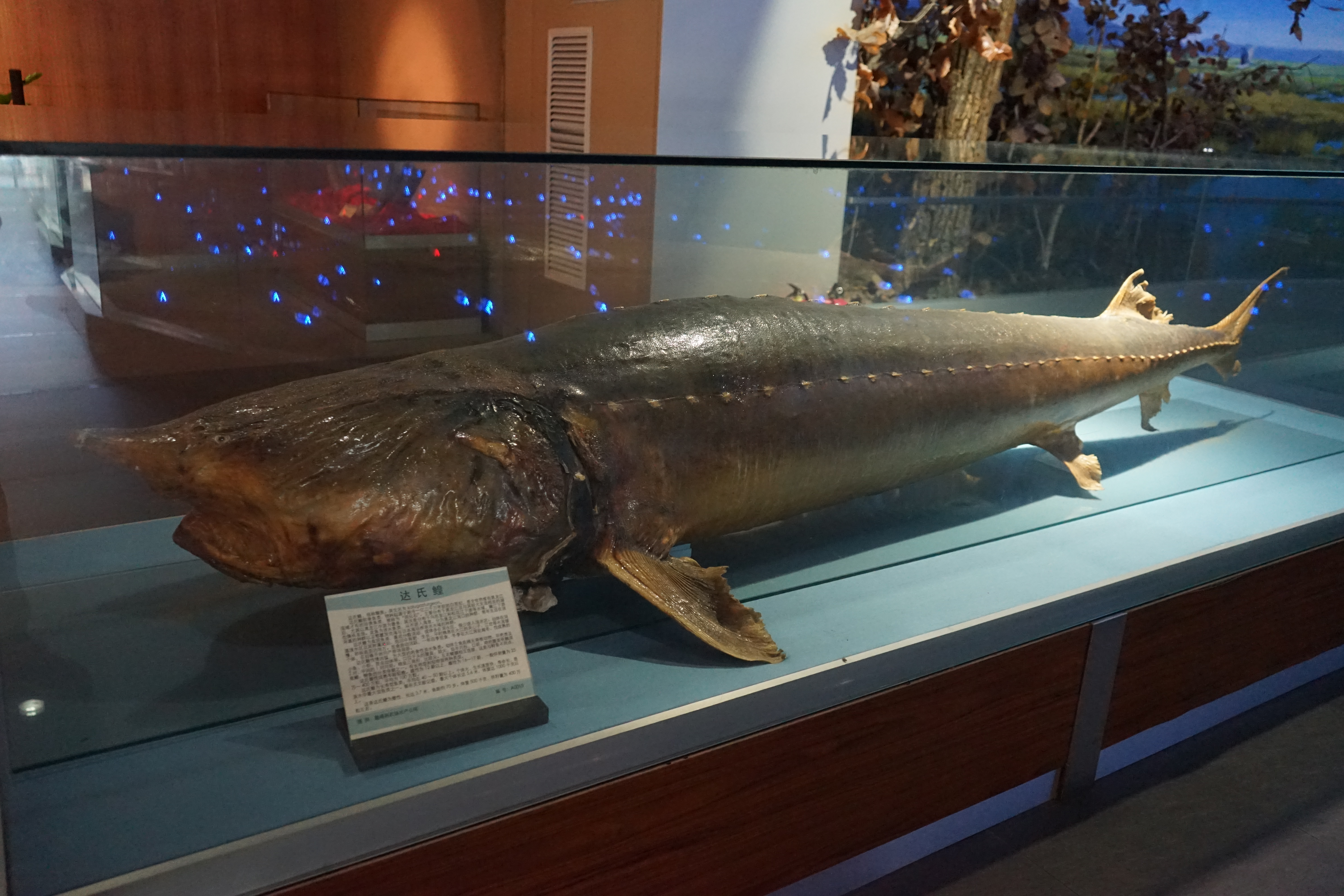 达氏鳇标本。雌性，3.7米，鱼龄约70岁。体重500千克，怀子量400万粒左右。勤德利农场水产公司提供